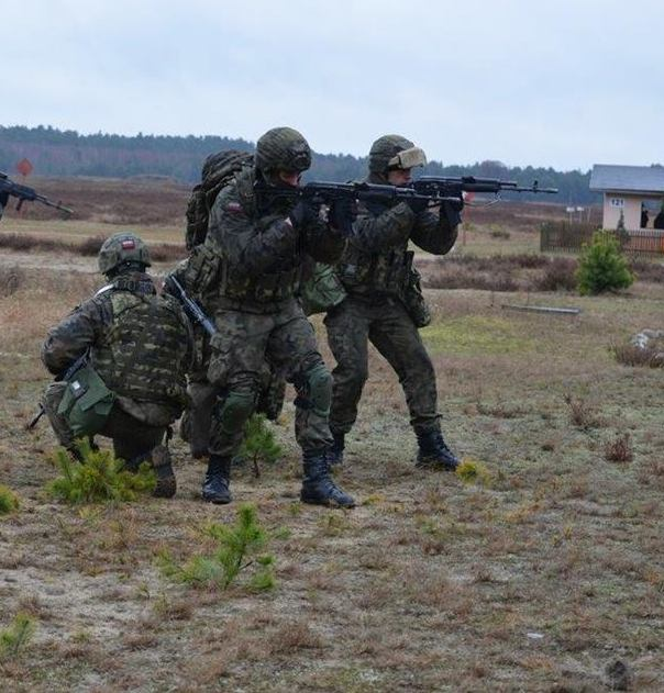 Ćwiczenia poligonowe